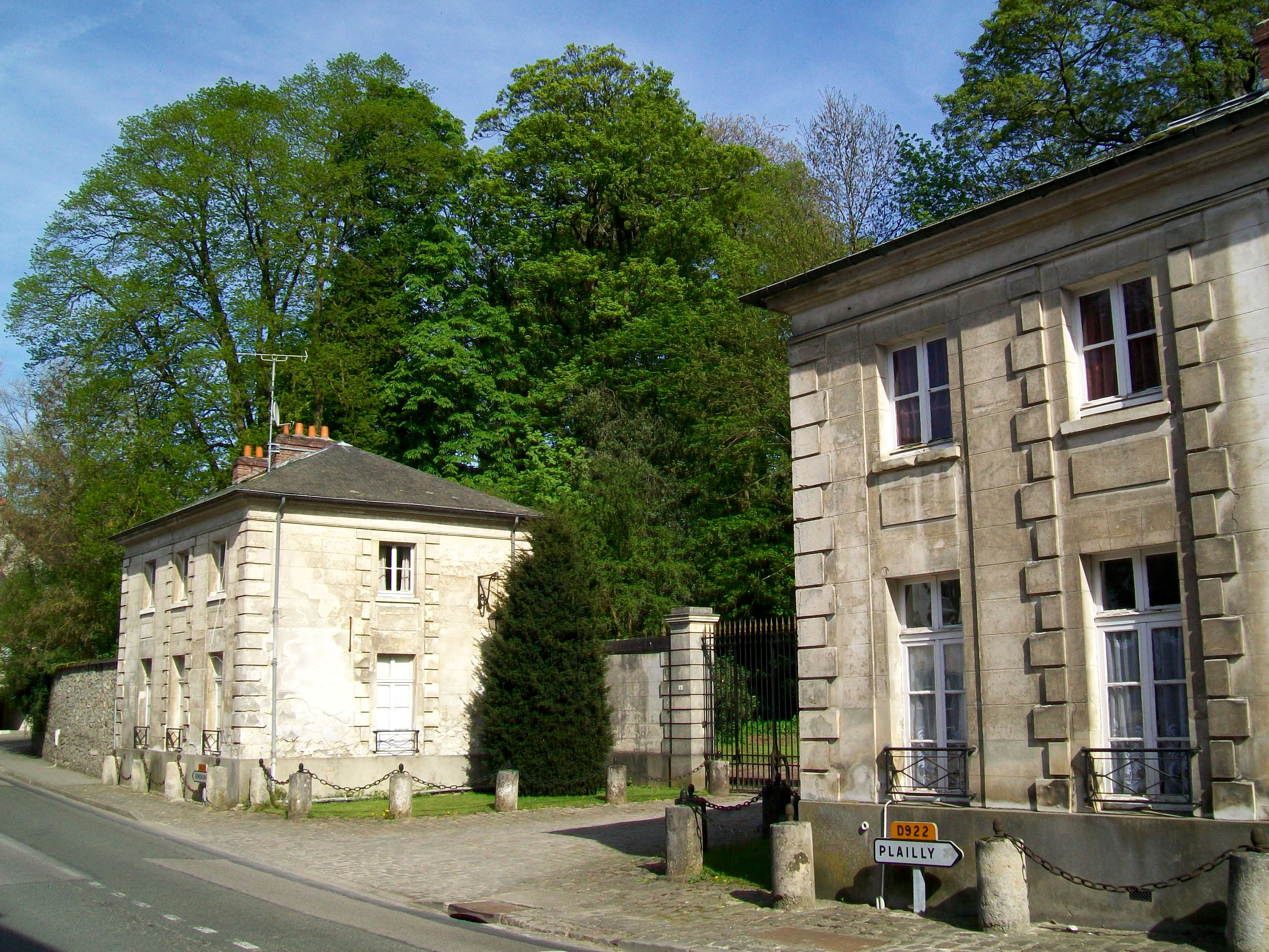 L'ancienne entrée du château de Mortefontaine et du « petit parc », avec ses deux maisons de garde.